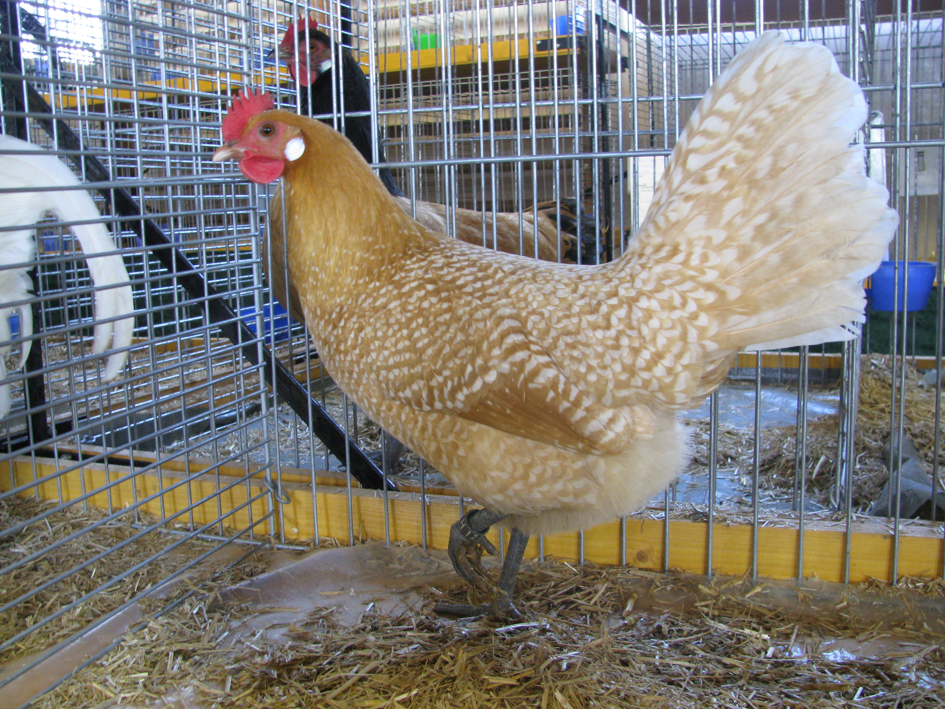 RGZV Frankenthal e.V. – Lokalschau in der Turnhalle Frankenthal vom 22. bis 23. November 2014 0,1 Friesenhühner, gelb-weißgeflockt, v97